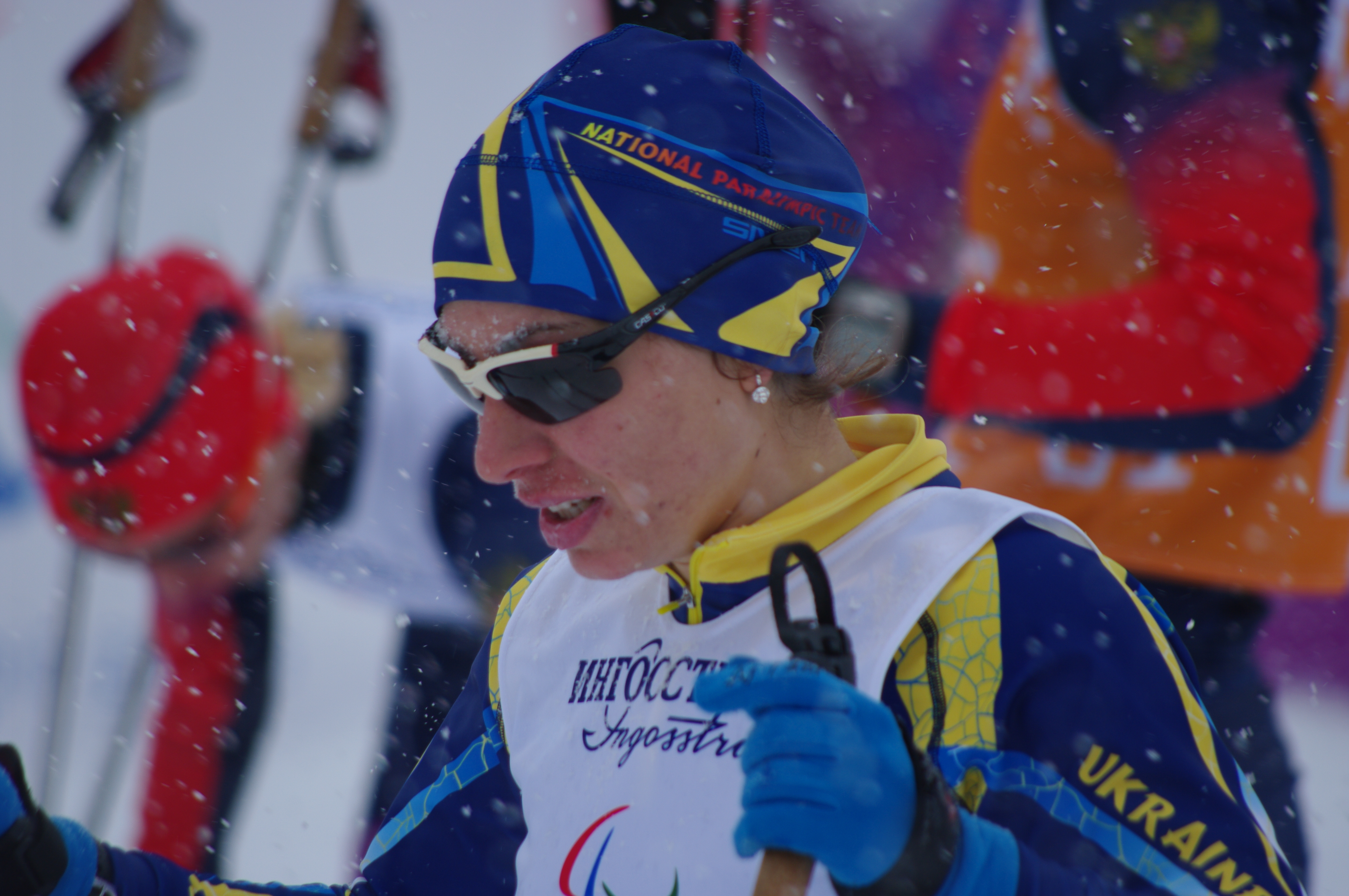 Ukraine at the Winter Paralympics